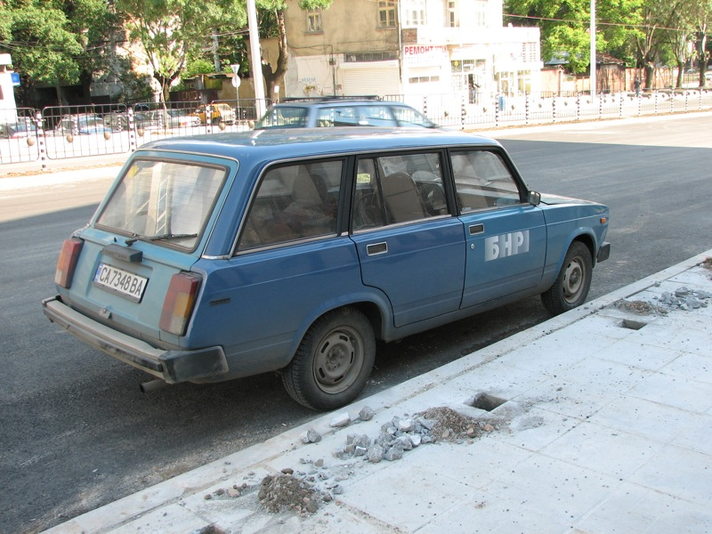 Lada 2104 in Sofia, Bulgaria.